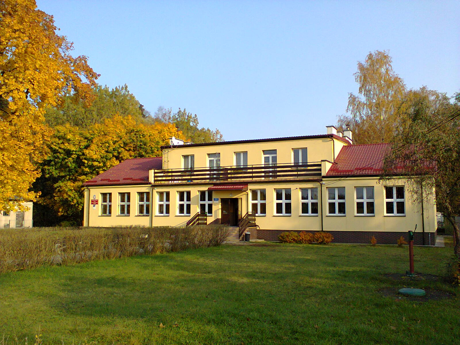 Uściany Stare - szkoła (powiat piski)